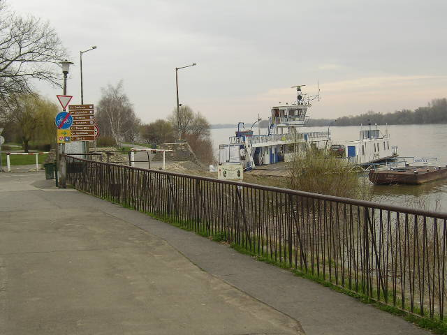 Vác–Tahitótfalu dunai rév a váci oldalon